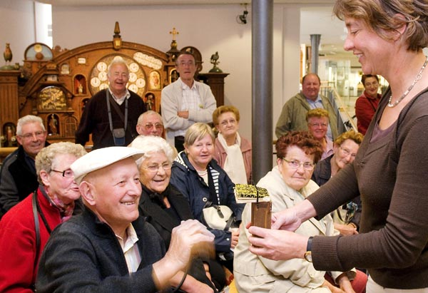 Deutsches Uhrenmuseum, Fuehrung